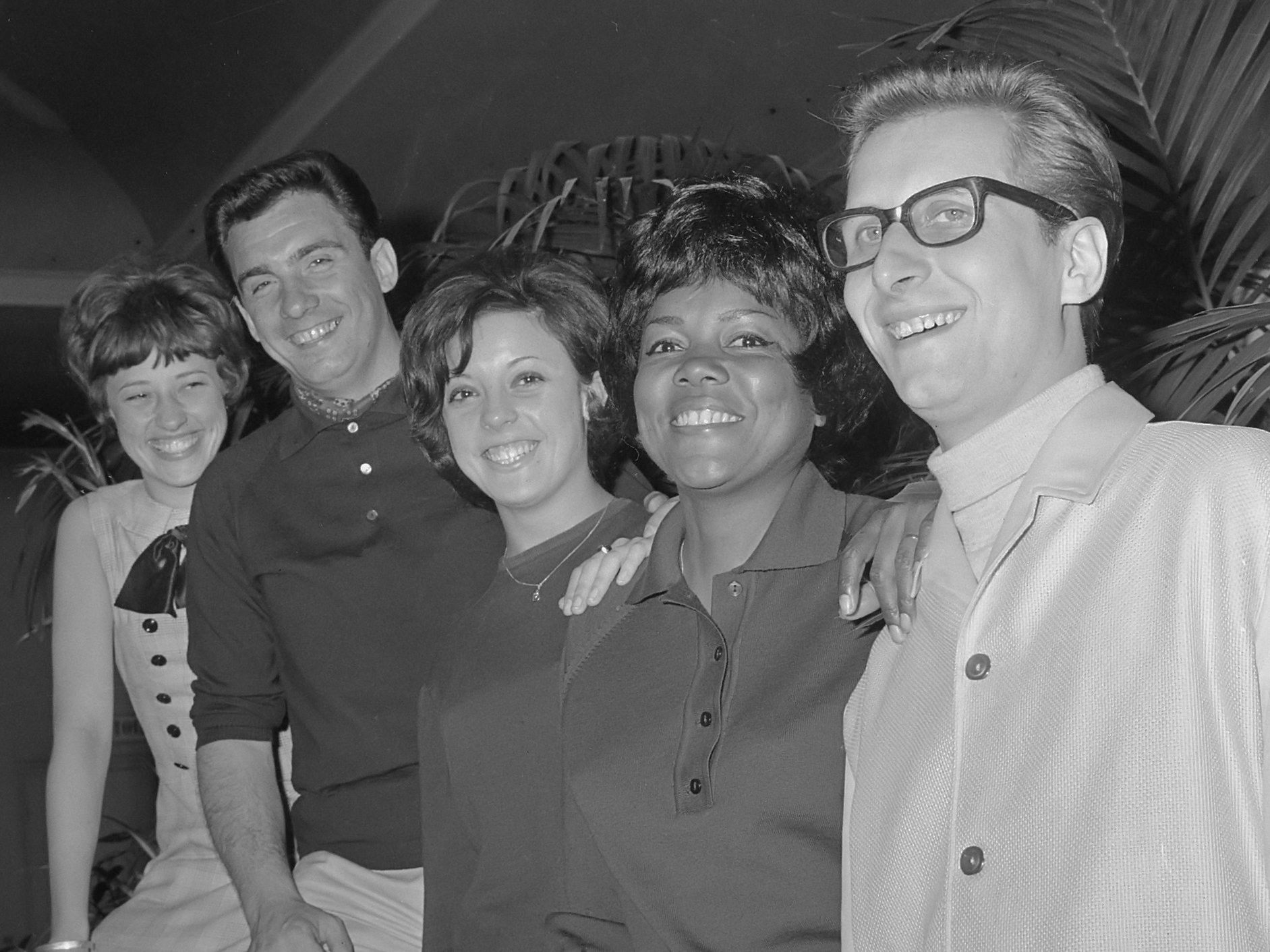 Belgische zangploeg te Knokke, v.l.n.r. Tonia, Maurice Dean , Liliane, Cecily Forde en Eddie Defacq 11 juli 1965